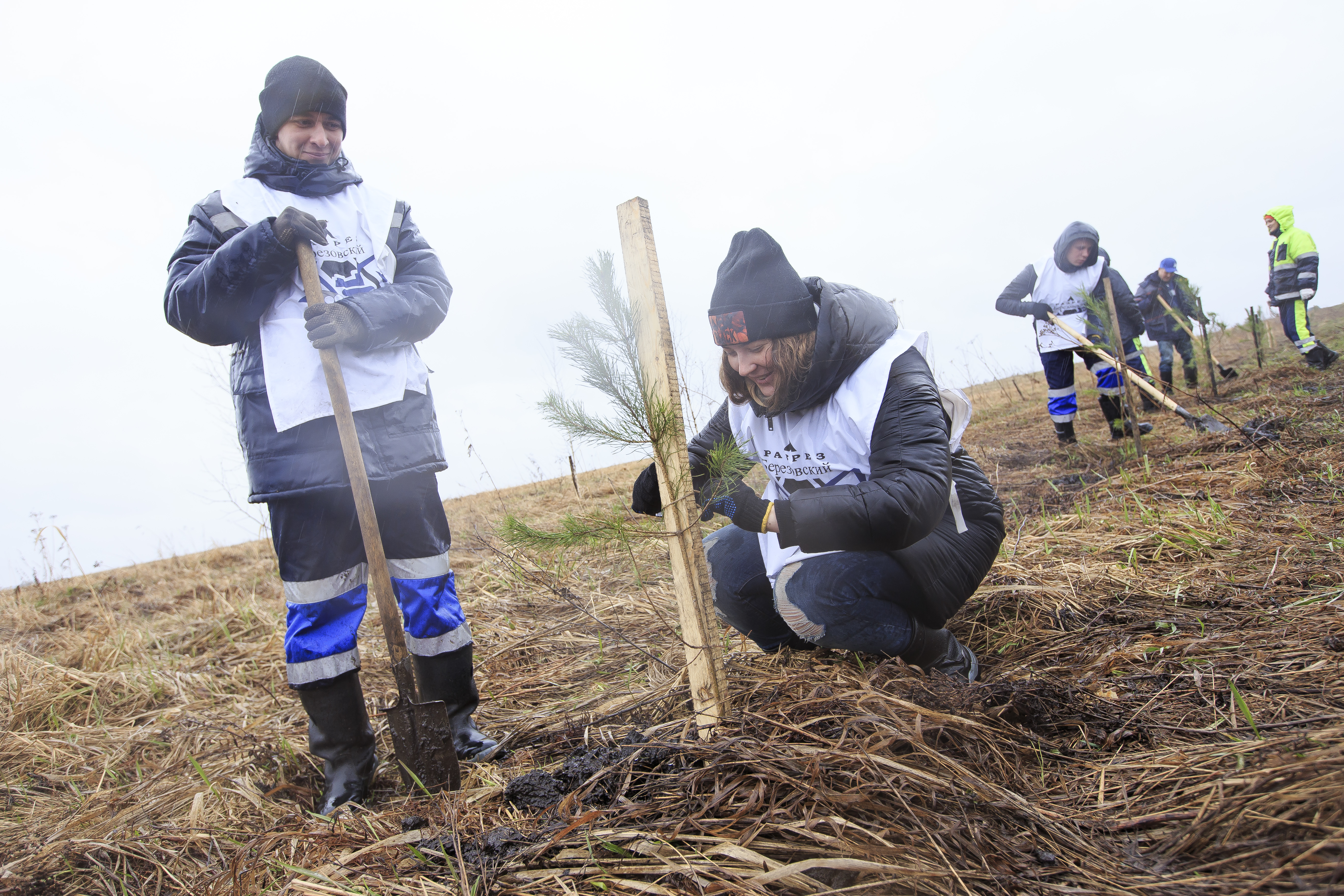 Молодые сотрудники разреза "Берёзовский" высаживают сосны в селе Берёзово Новокузнецкого района.